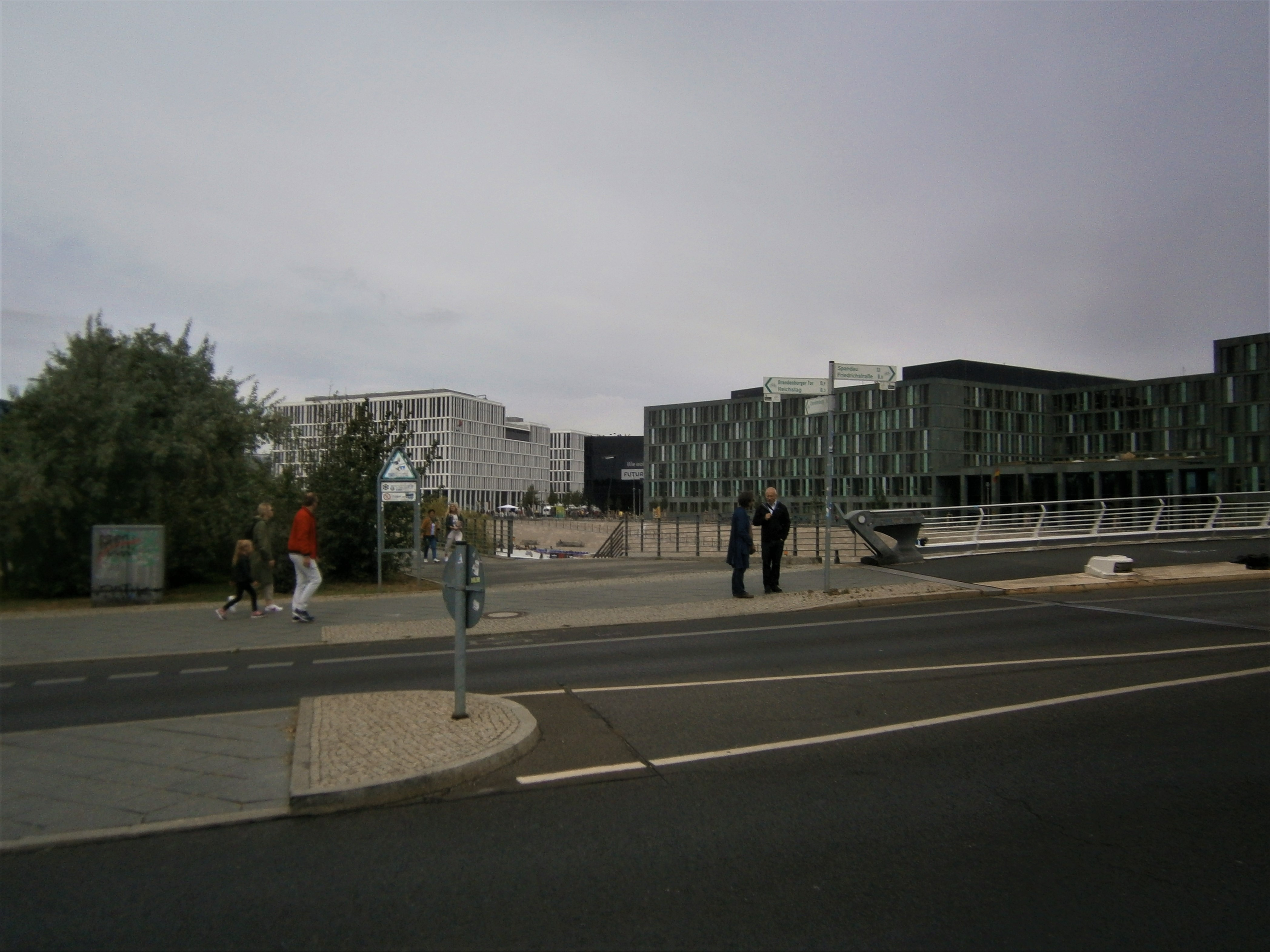 Blick von der Konrad-Adenauer-Straße neben der Kronprinzenbrücke nach Nordwest ins Ludwig-Erhard-Ufer über Spreebogenpark und Spree zum Kapelle-Ufer mit Bürogebäude, Futurium und Bundesbildungsministerium. Die Konrad-Adenauer-Straße ist eine Straße im Berliner Regierungsviertel, Ortsteil Berlin-Tiergarten, Bezirk Mitte.